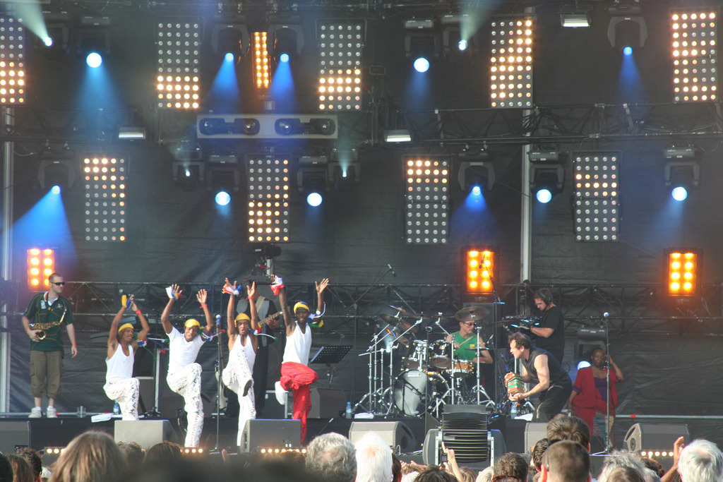 Johnny Clegg à la fête de l'Humanité, France